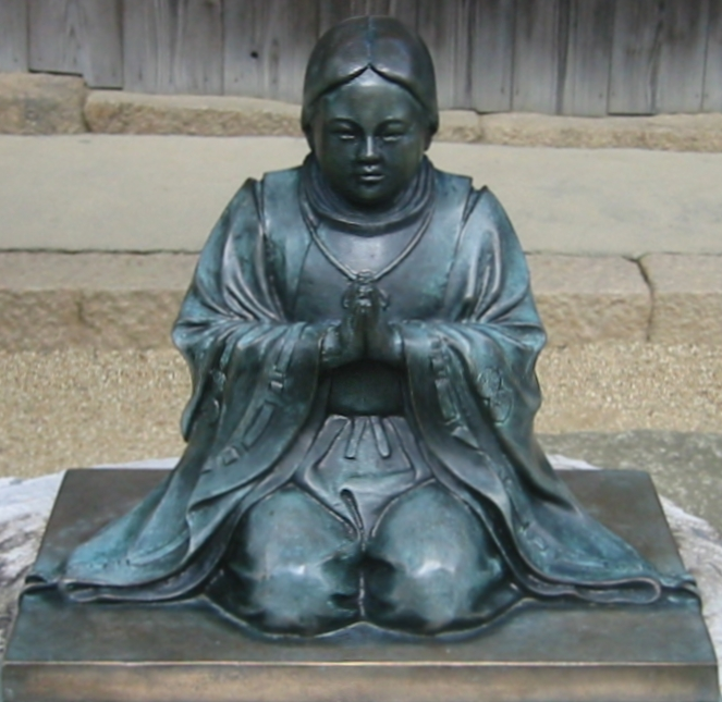 法然上人(有馬 摂取山念佛寺)